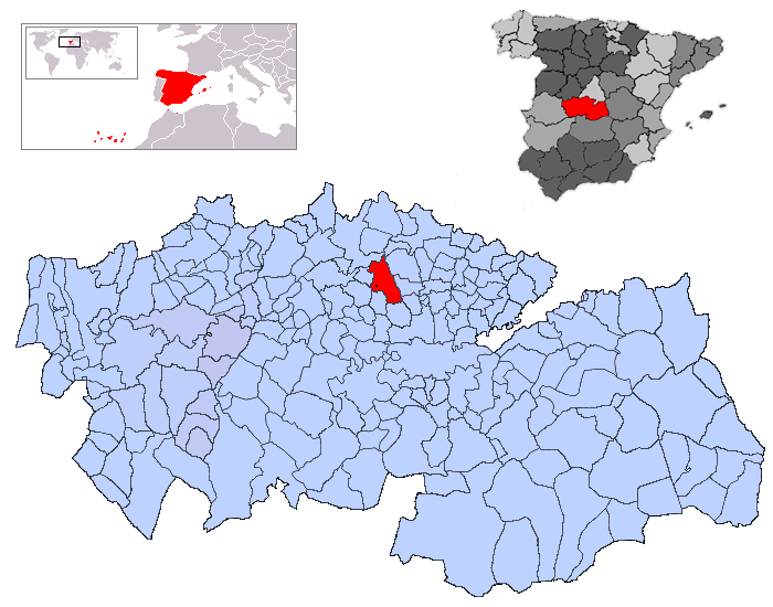 Fuensalida en la provincia de Toledo